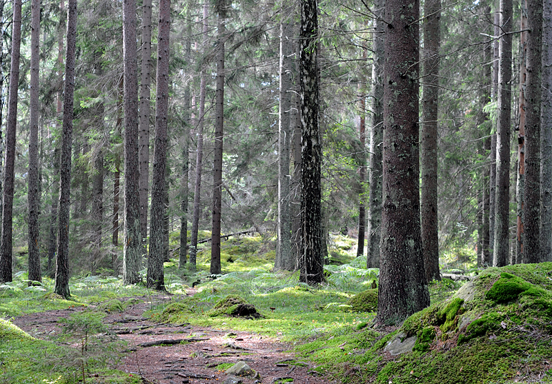 Likåldrig granskog vid Nävsjön i Södermanland